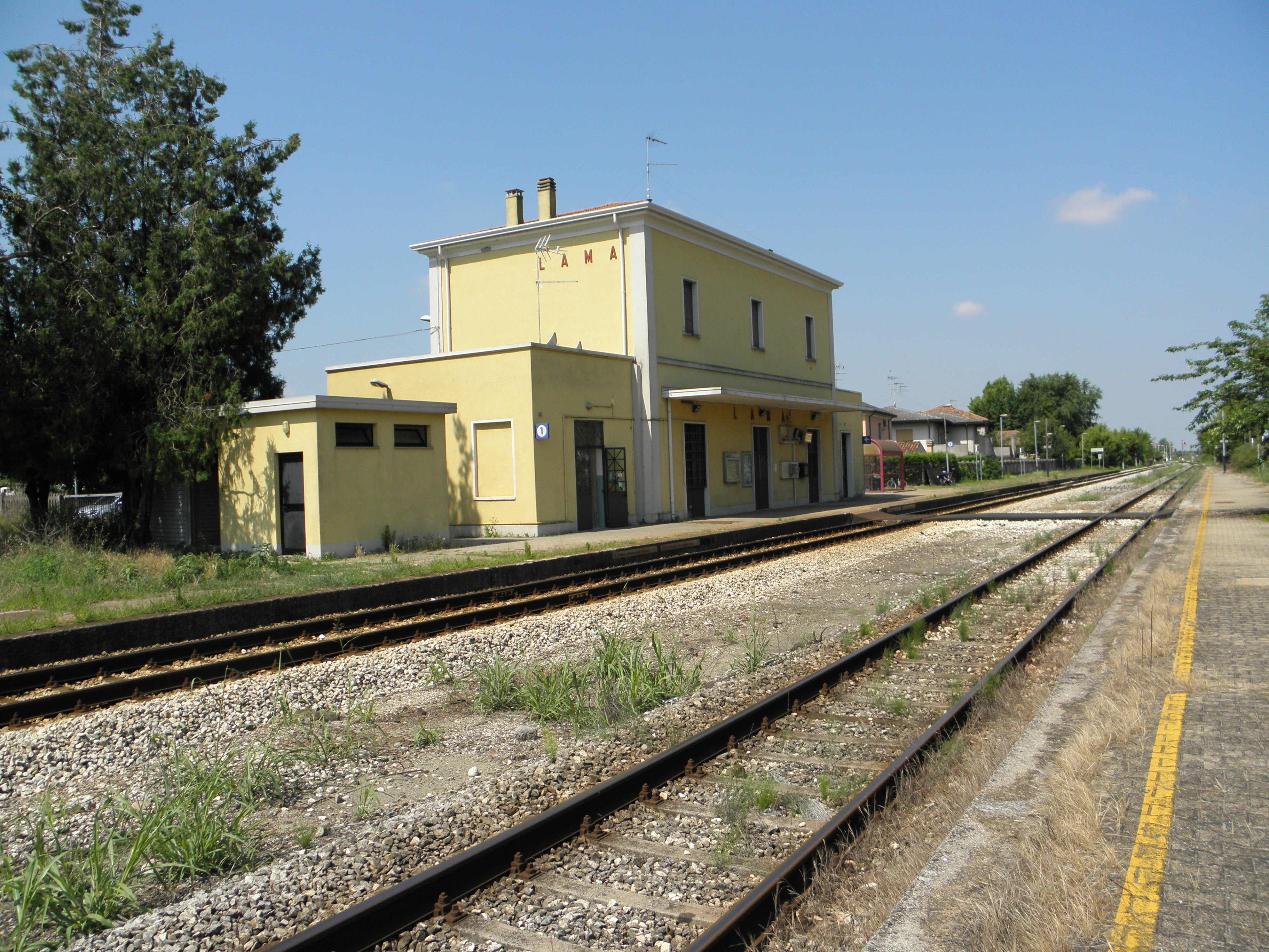 Lama Polesine, frazione di Ceregnano: il fabbricato viaggiatori della stazione ferroviaria lato piazzale del ferro, direzione Ceregnano.